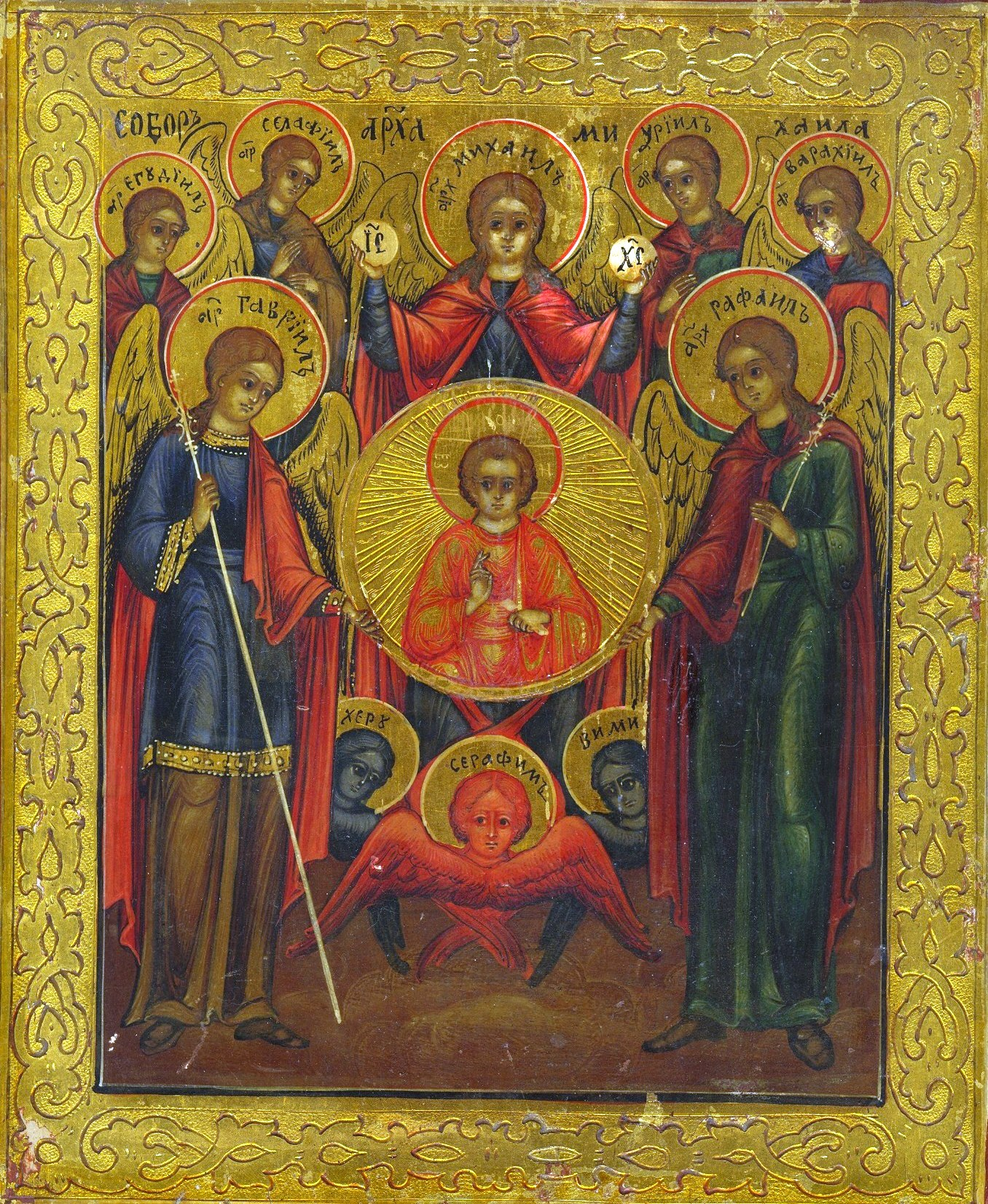 Icona della Chiesa Ortodossa Russa dell' Assemblea dell'Arcangelo Michele. Tempera su legno. La rappresentazione dei sette arcangeli. Michele al centro, sopra la mandorla di Cristo. Gabriele and Raffaele in piedi a fianco rispettivamente a sinistra e destra. Dietro di loro, da sinistra a destra Jehudiel, Selaphiel, Uriel, e Baraquiel.